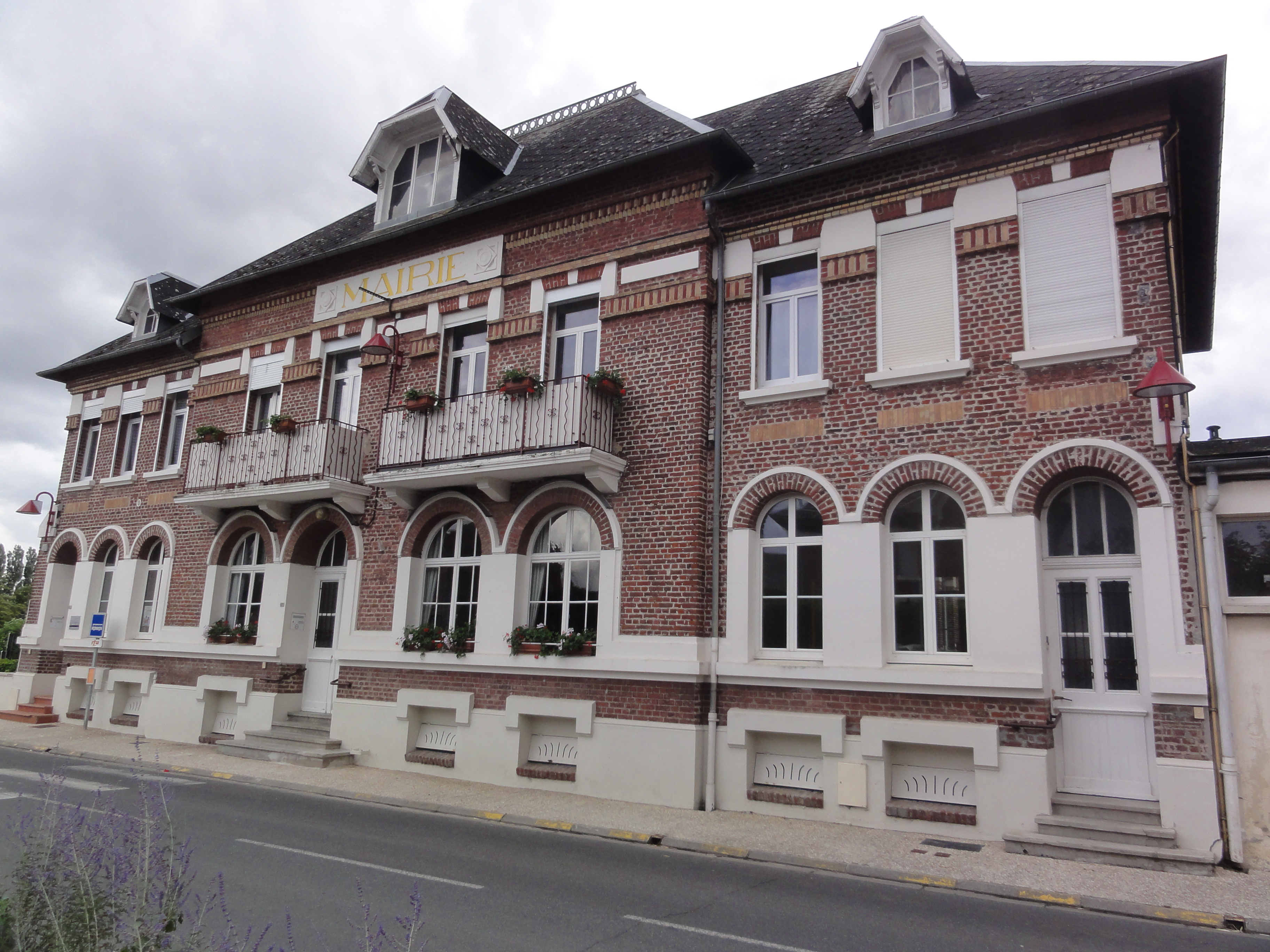 Savy (Aisne) mairie